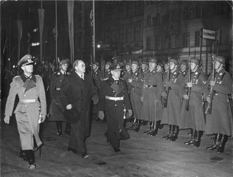 Scherl: Der südafrikanische Vertreidigungs- und Sicherheitsminister Pirow verliess gestern abend Berlin. UBz: ihn beim Abschreiten der Front der Ehrenkompanie der Luftwaffe vor dem Anhalter Bahnhof; rechts von ihm Admiral Canaris, der in Vertretung für Generaloberst Keitel erschienen war und links der Kommandant von Berlin Generalleutnant Seifert. Fot. Wag 27.11.1938